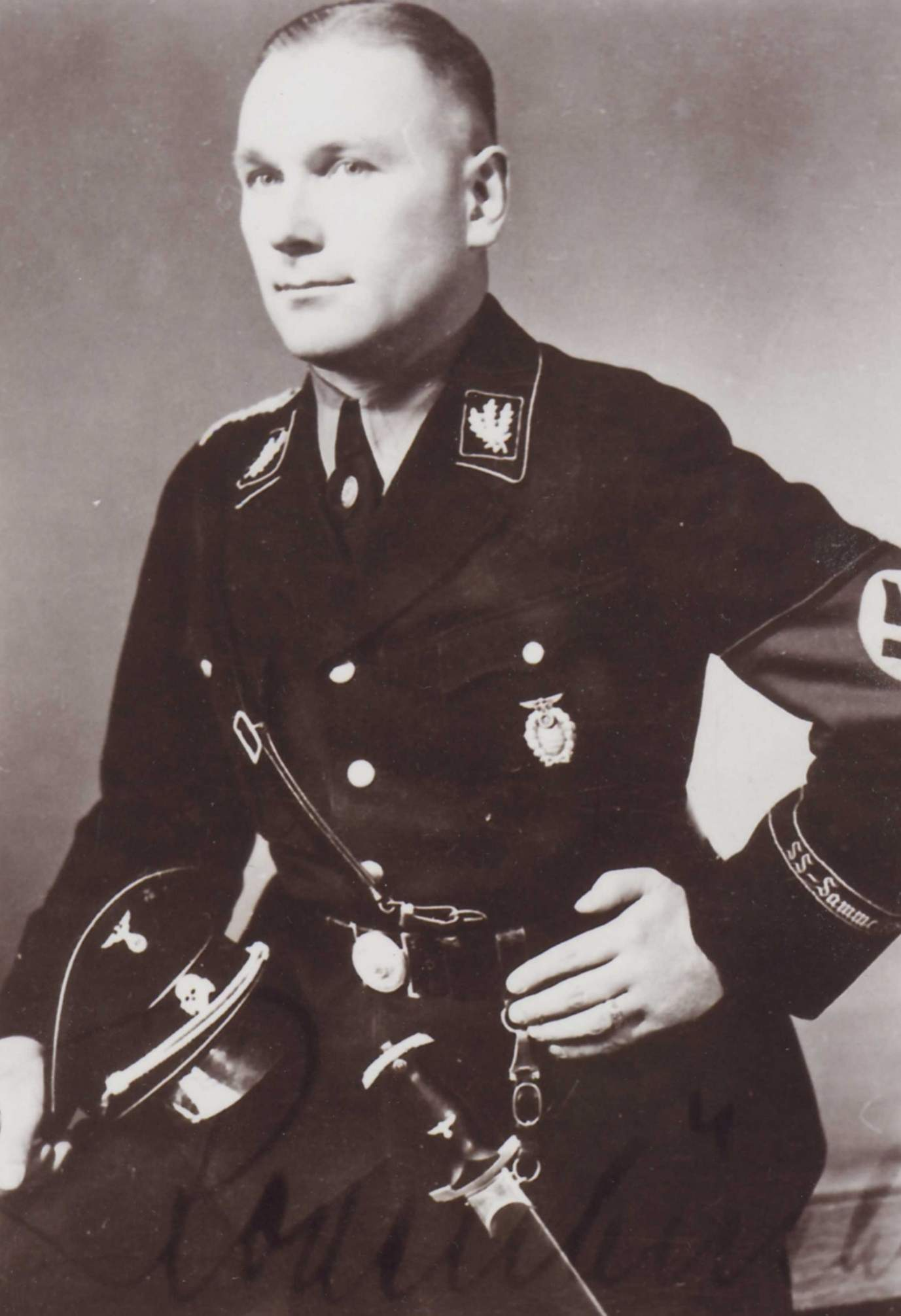 Alfred Rodenbücher, (* 29. September 1900 in Schopfheim; † 29. März 1979 in Emmendingen) Reichstagsabgeordneter (NSDAP)